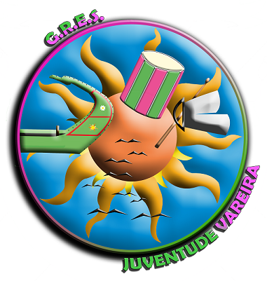 simbolo juventude vareira 2012